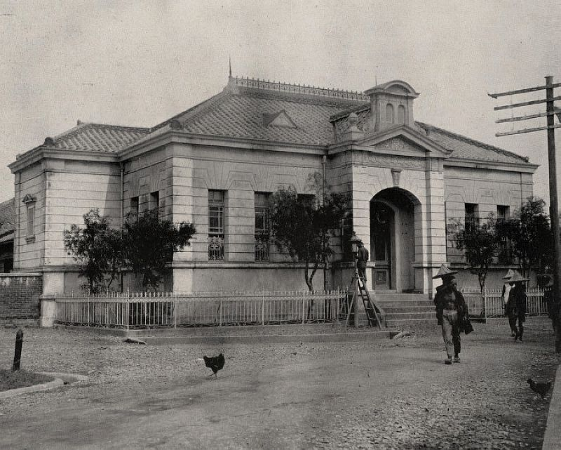 日治時期臺灣銀行宜蘭支店